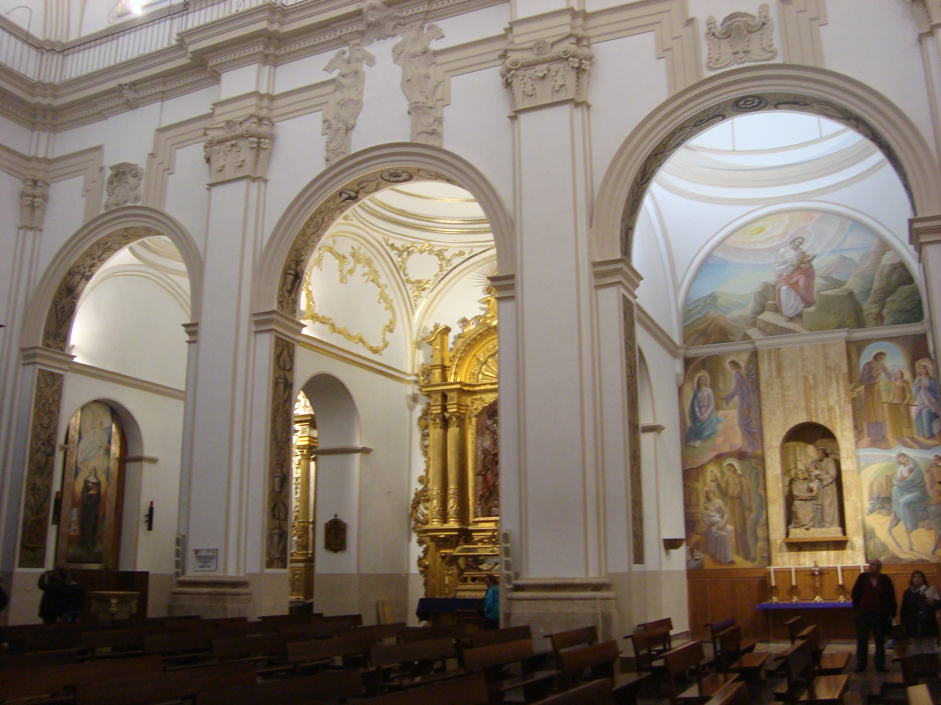 Capelles laterals de l'esglesia de Sant Bartomeú de Benicarló, Castelló